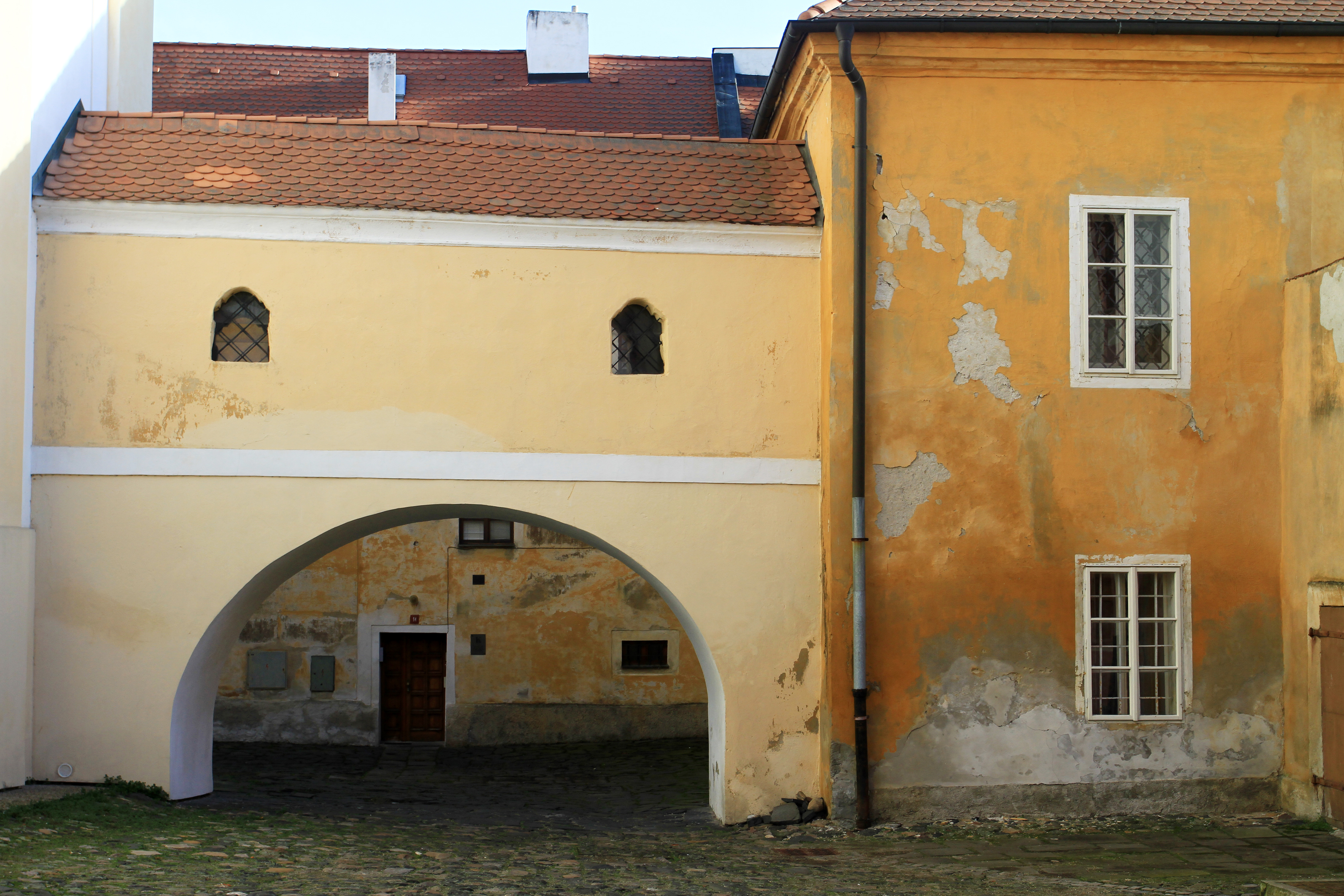 Děkanství, Mírové náměstí 85, Kadaň.